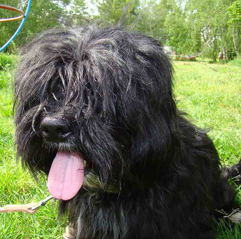 Our Havanese dog boy